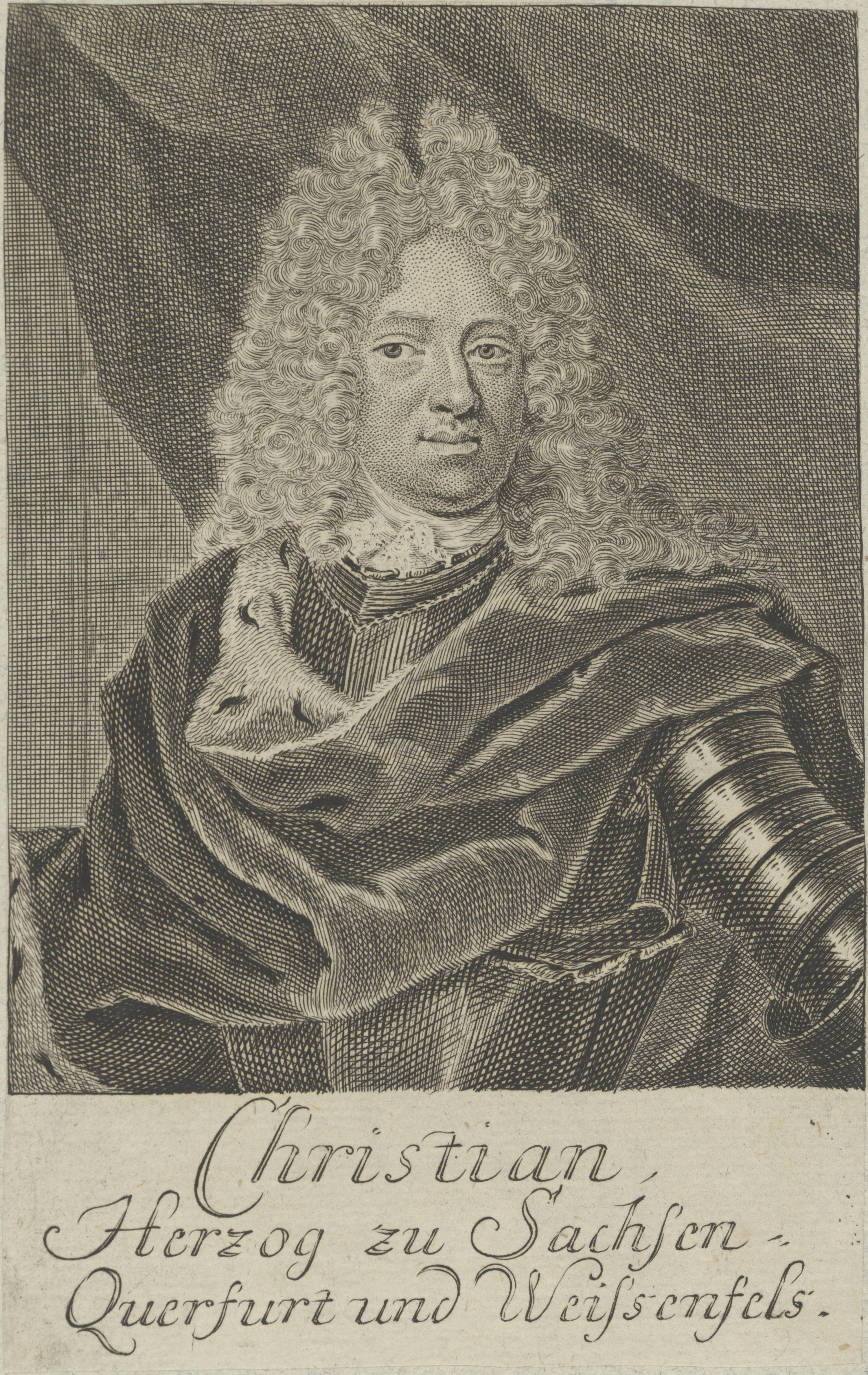 Depicted person: Christian von Sachsen-Weißenfels